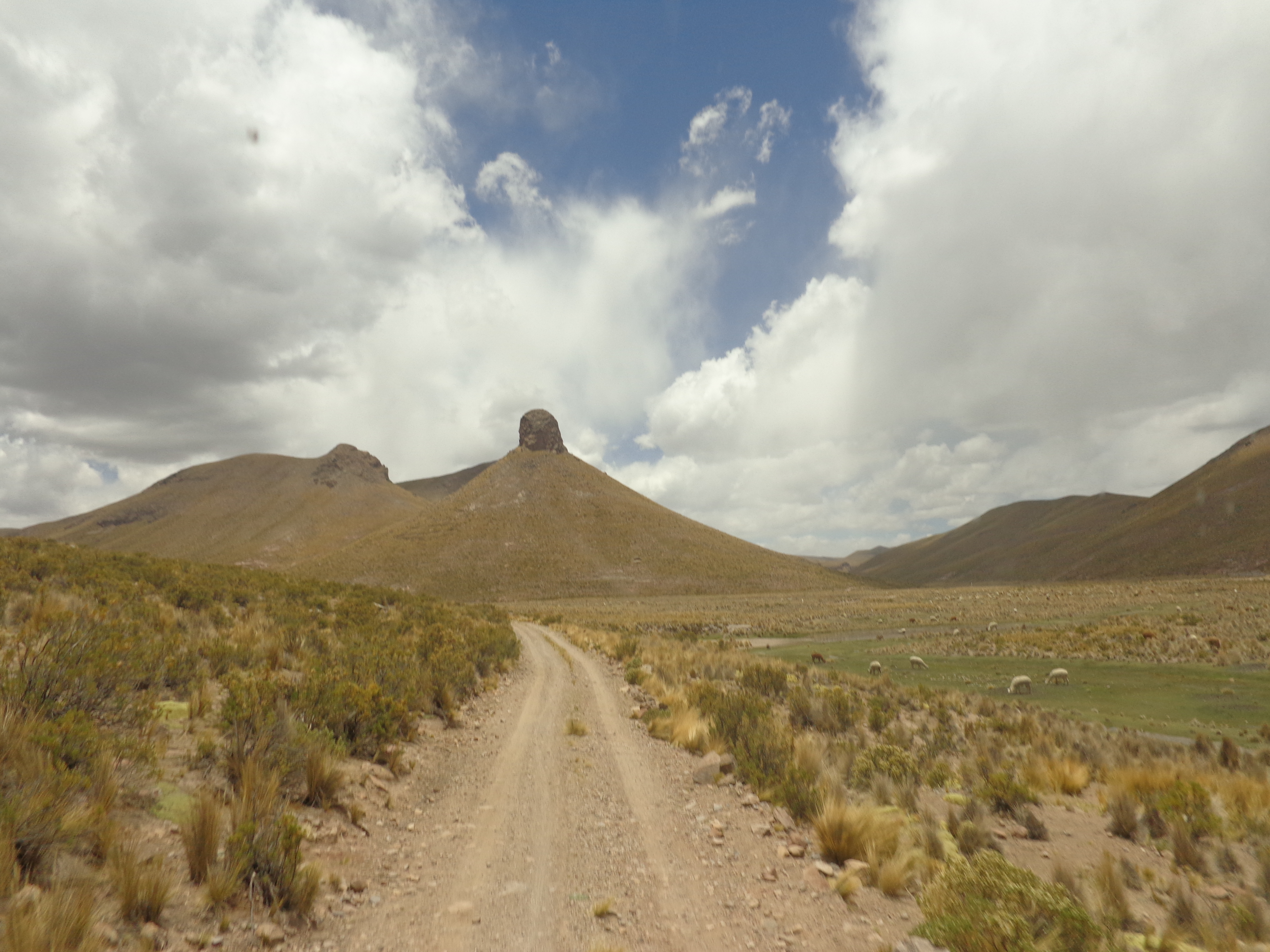 Sitio arqueológico Nuño Qollo, Municipio de Santiago de Machaca